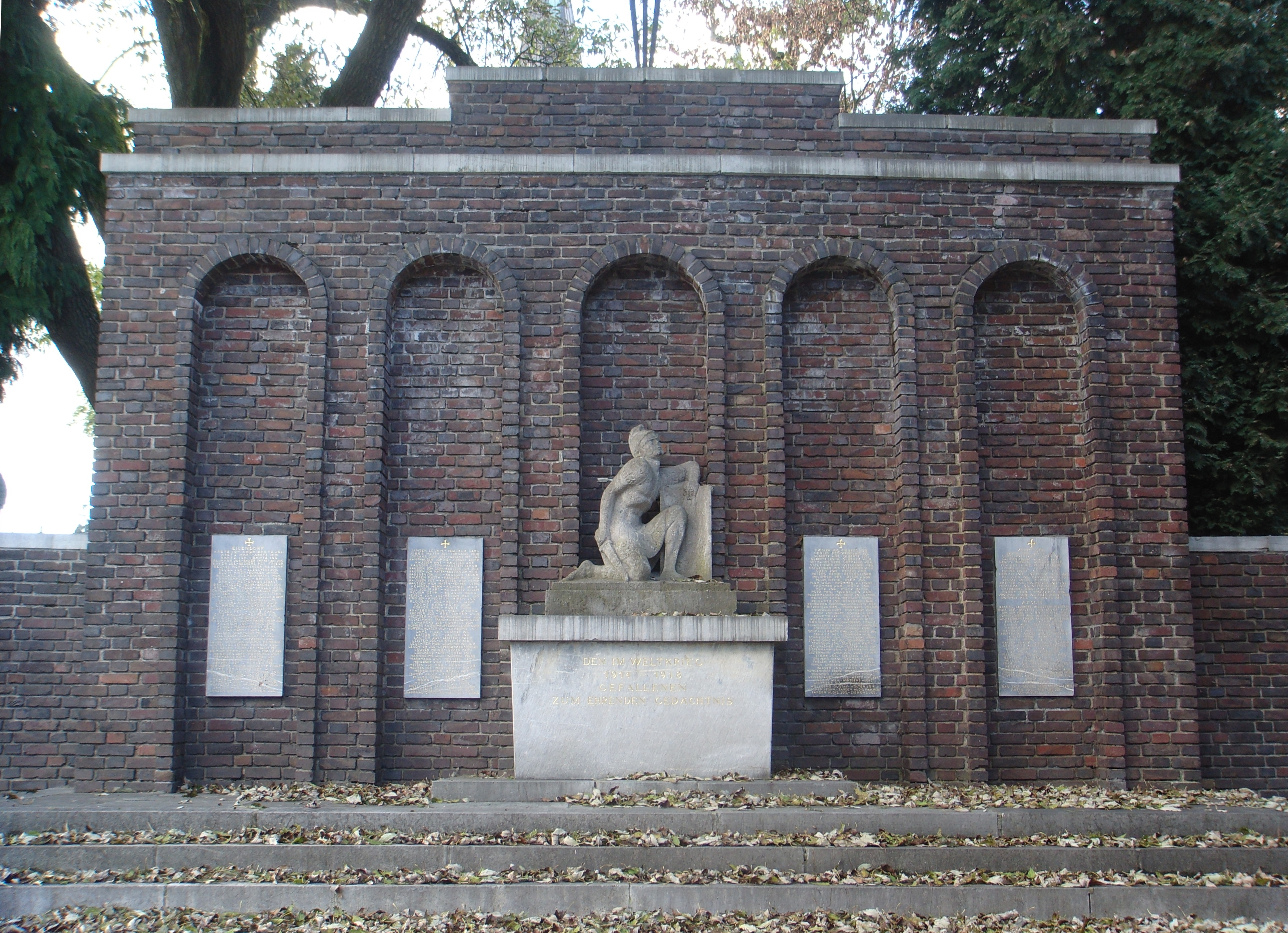 Entwurf von Joseph Buchkremer: Kriegerdenkmal für die Gefallenen des Ersten Weltkriegs in Eilendorf, unterhalb des alten Friedhofes von St. Severin enthüllt am 20. November 1927; auf dem Sockel der Heilige Sebastian in der Pose eines sterbenden Kriegers nach einem Entwurf des Aachener Bildhauers Fritz Neumann, * 1881.